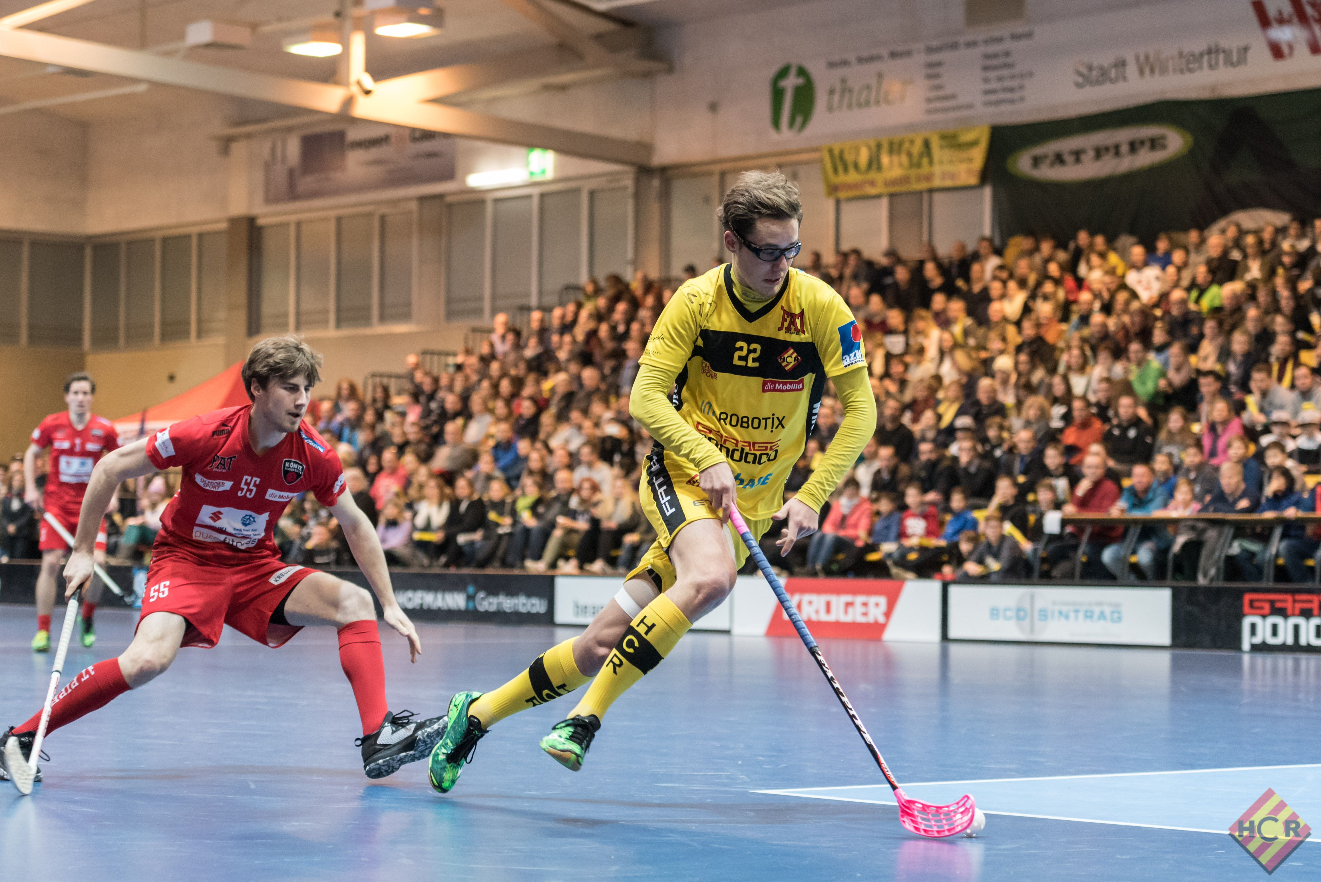 Michel Wöcke im Zweikampf.